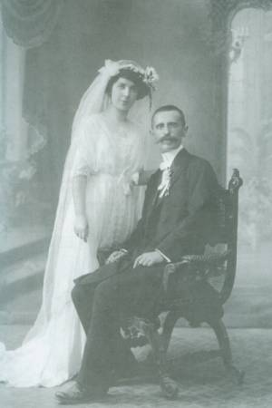 Коста Николов и Перса Кръстева